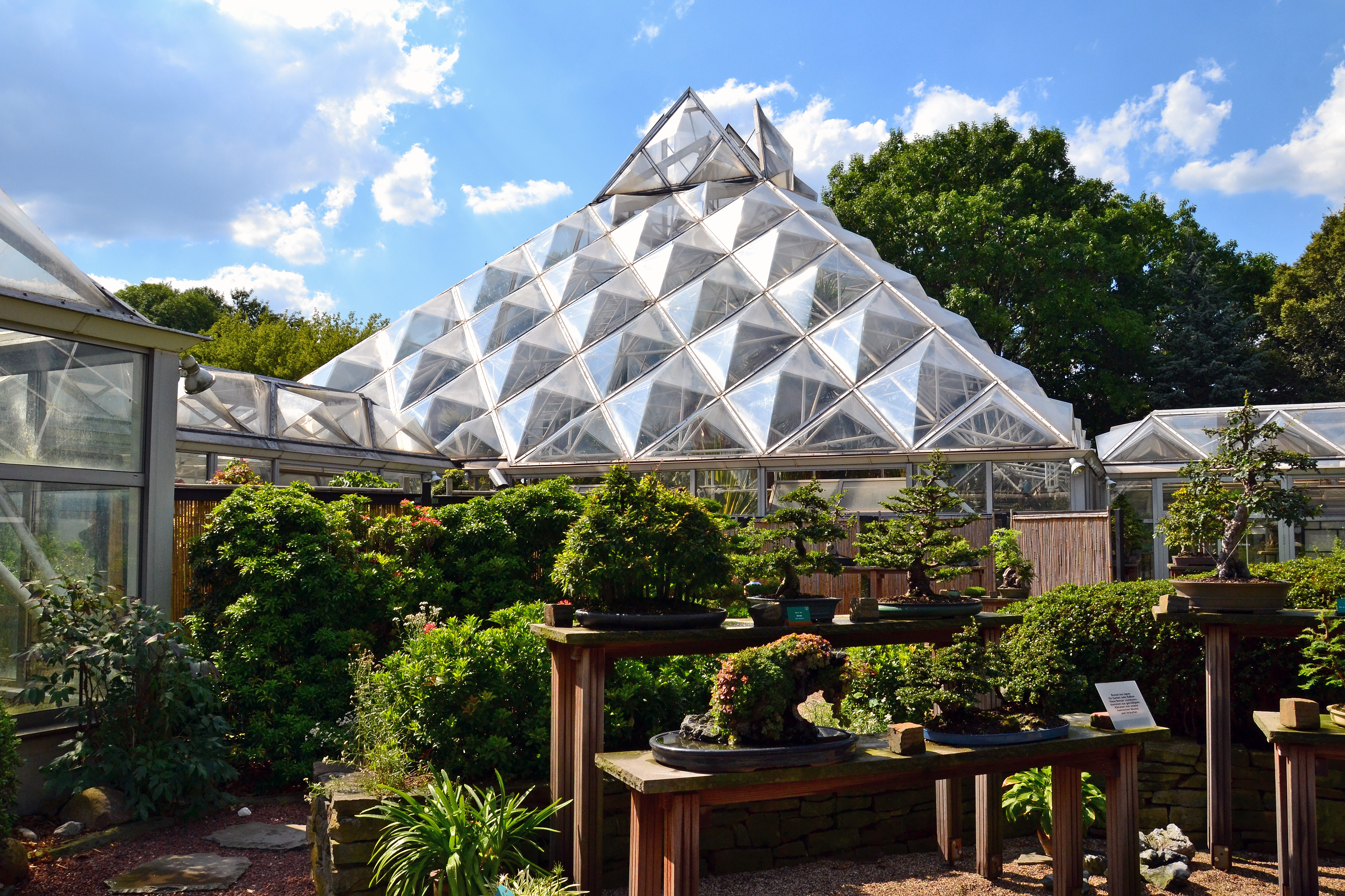 Tropenhaus, Grugapark Essen